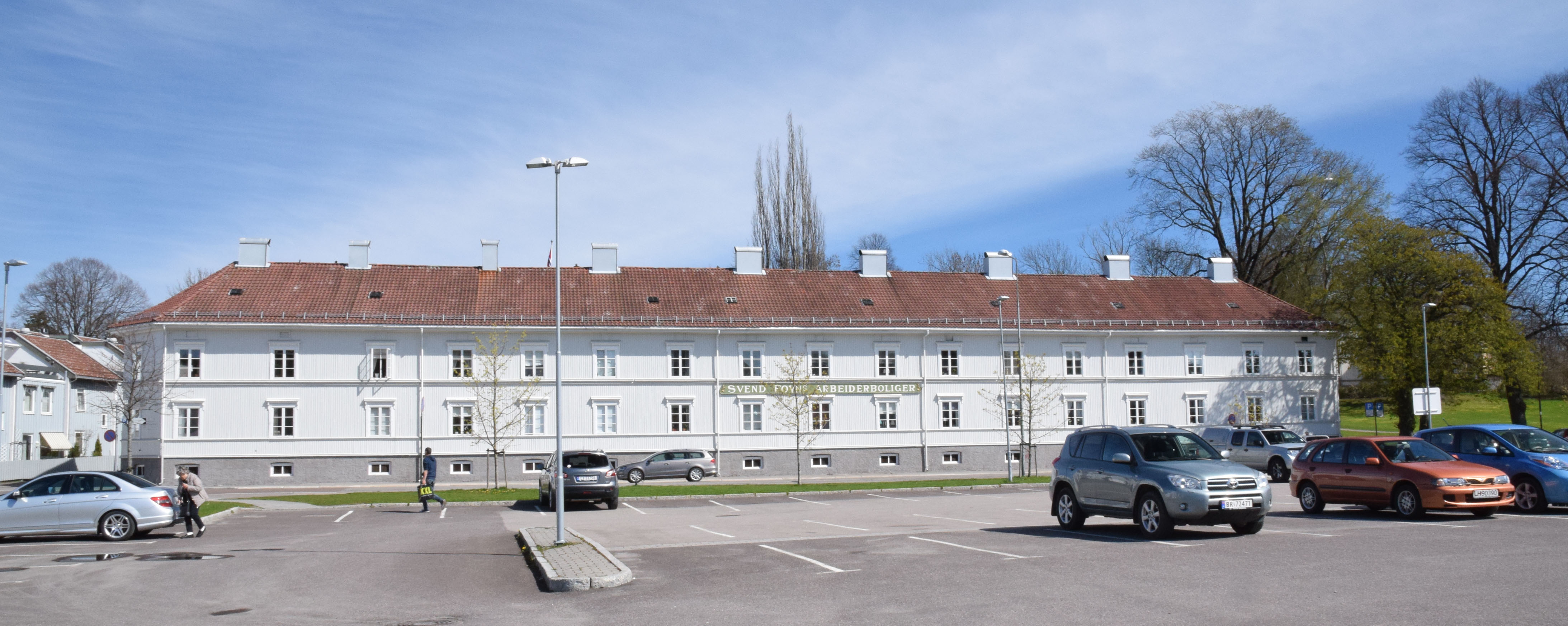 Svend Foyns arbeiderboliger, ved Gunnarsbøparken, Svend Foyns gate 1A